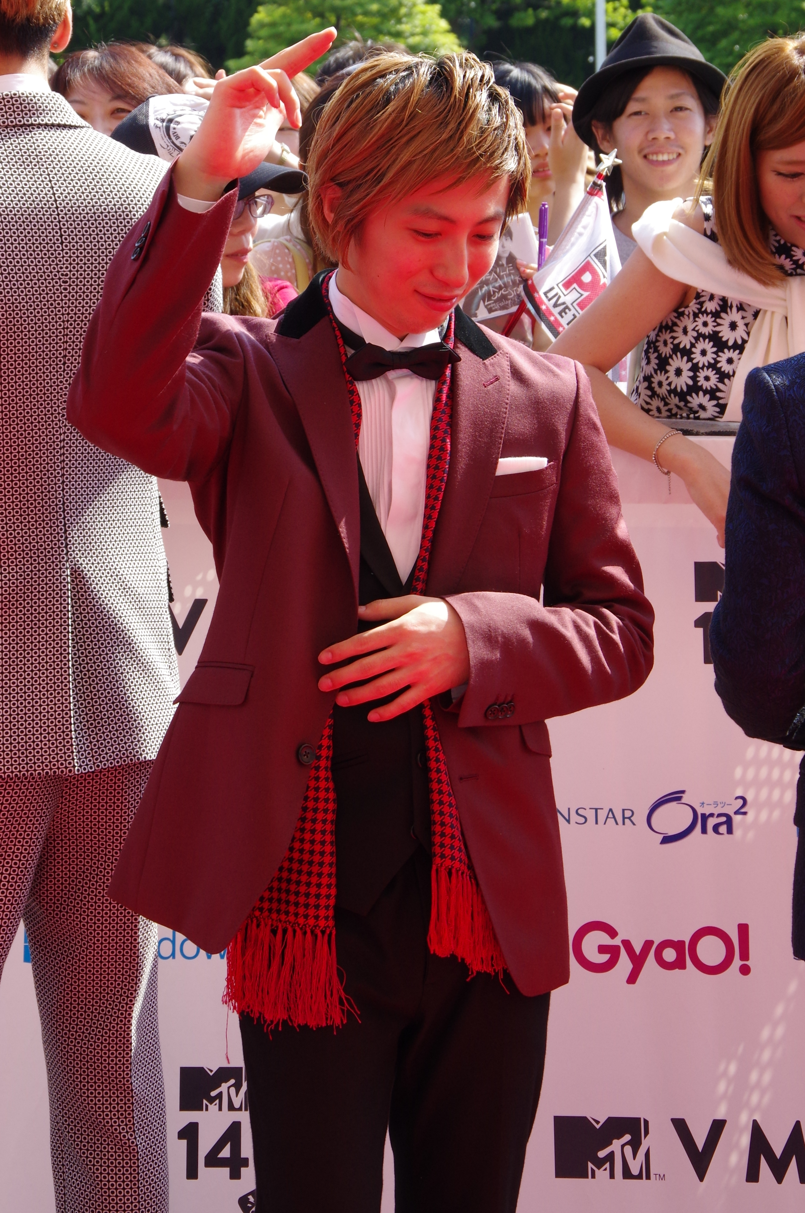 MTV VMAJ 2014_016_w-inds.